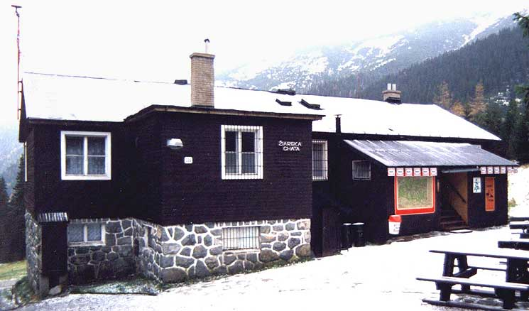 Stare, już nieistniejące Schronisko Żarskie